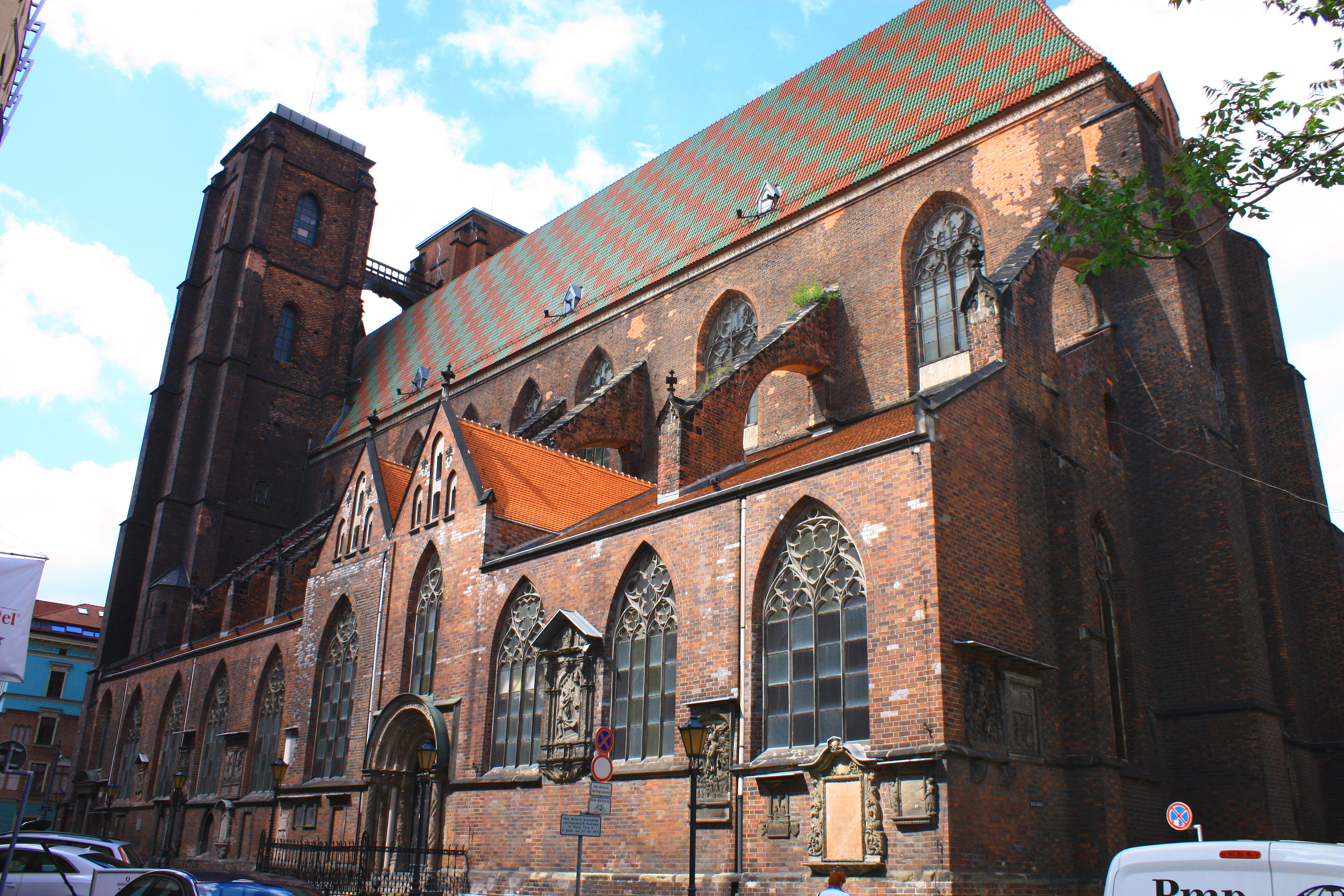 Wrocław, kościół p.w. św. Marii Magdaleny, ob. katedra polsko-kat., 1342-1360, 1 poł. XV, 1888-1992, po 1945